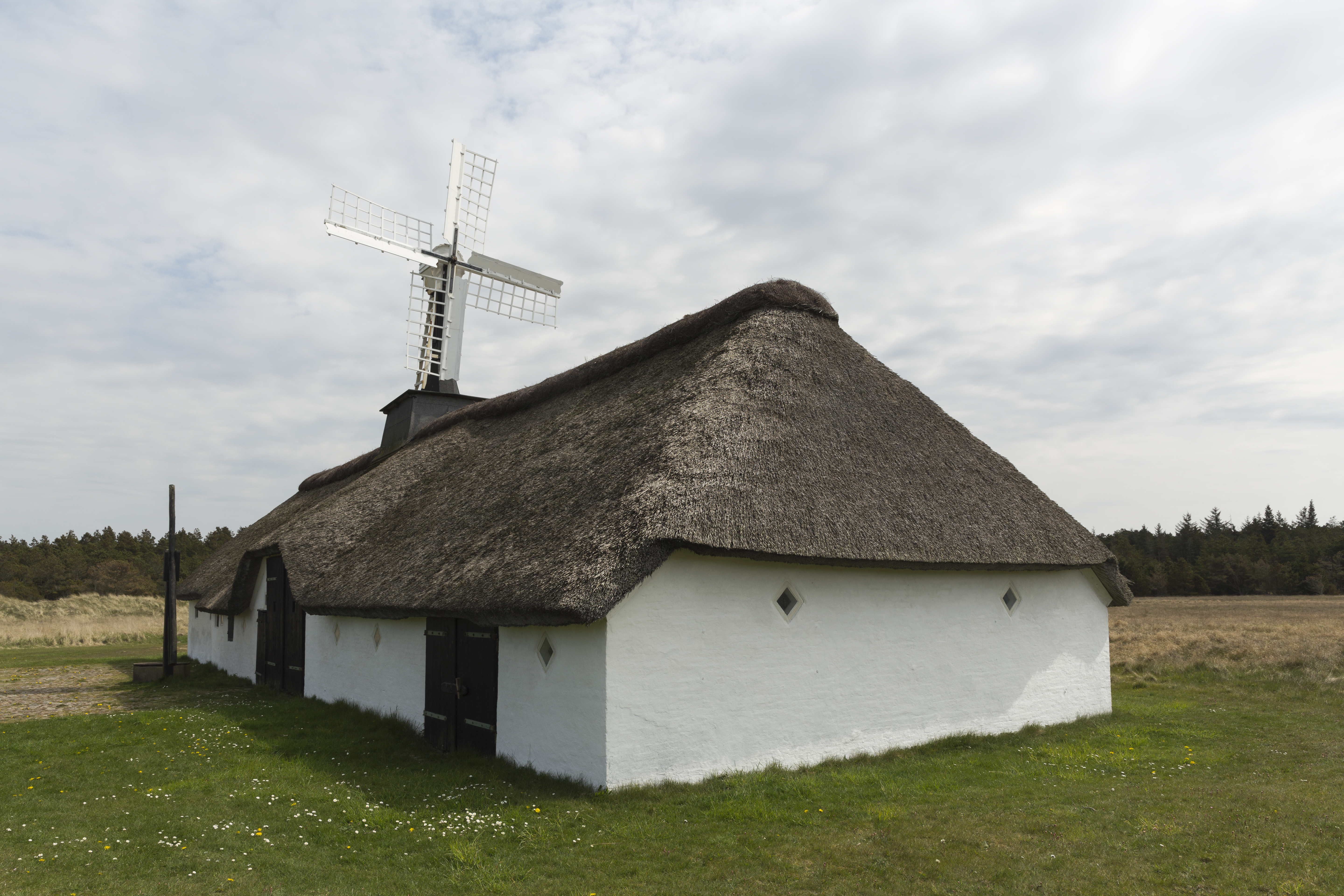 Østerklit Stokmølle mellem Skiveren og Tversted